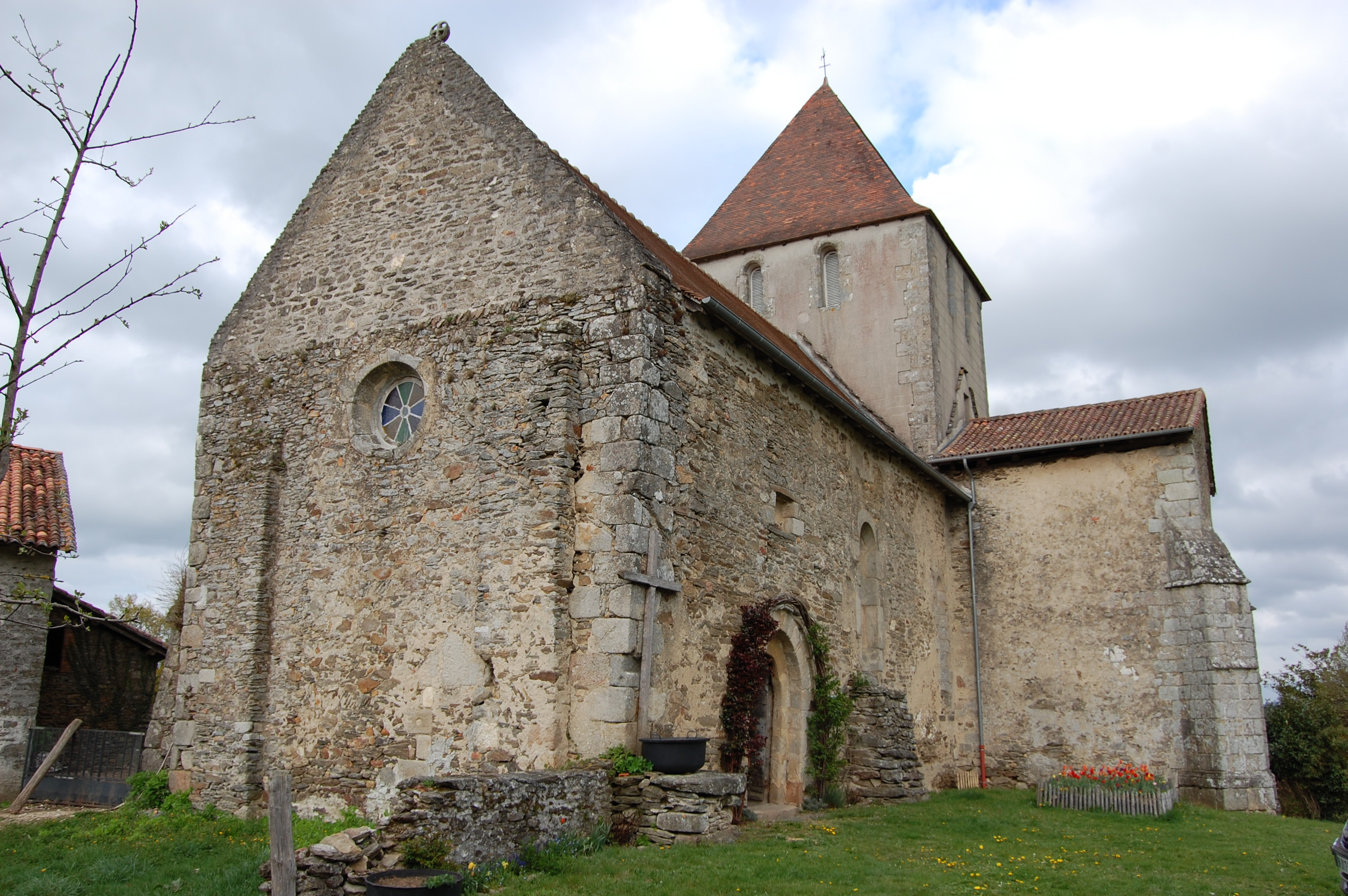 Église fortifiée Saint-Étienne de Lageyrat, sur la commune de Châlus en Limousin, placée sous le patronnage de saint Étienne et de sainte Quitterie.